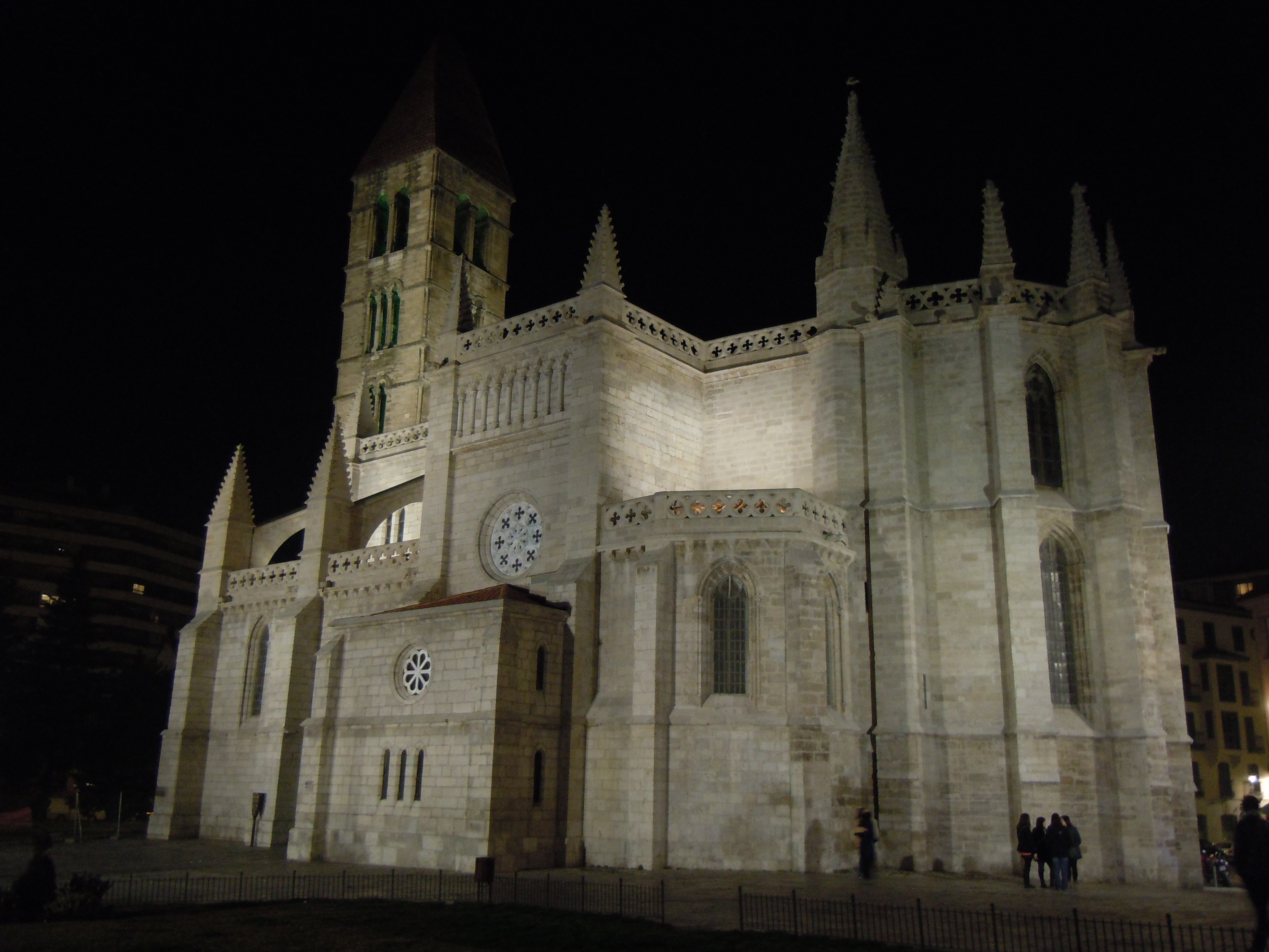 Iglesia de Santa María La Antigua, Valladolid (Spain).